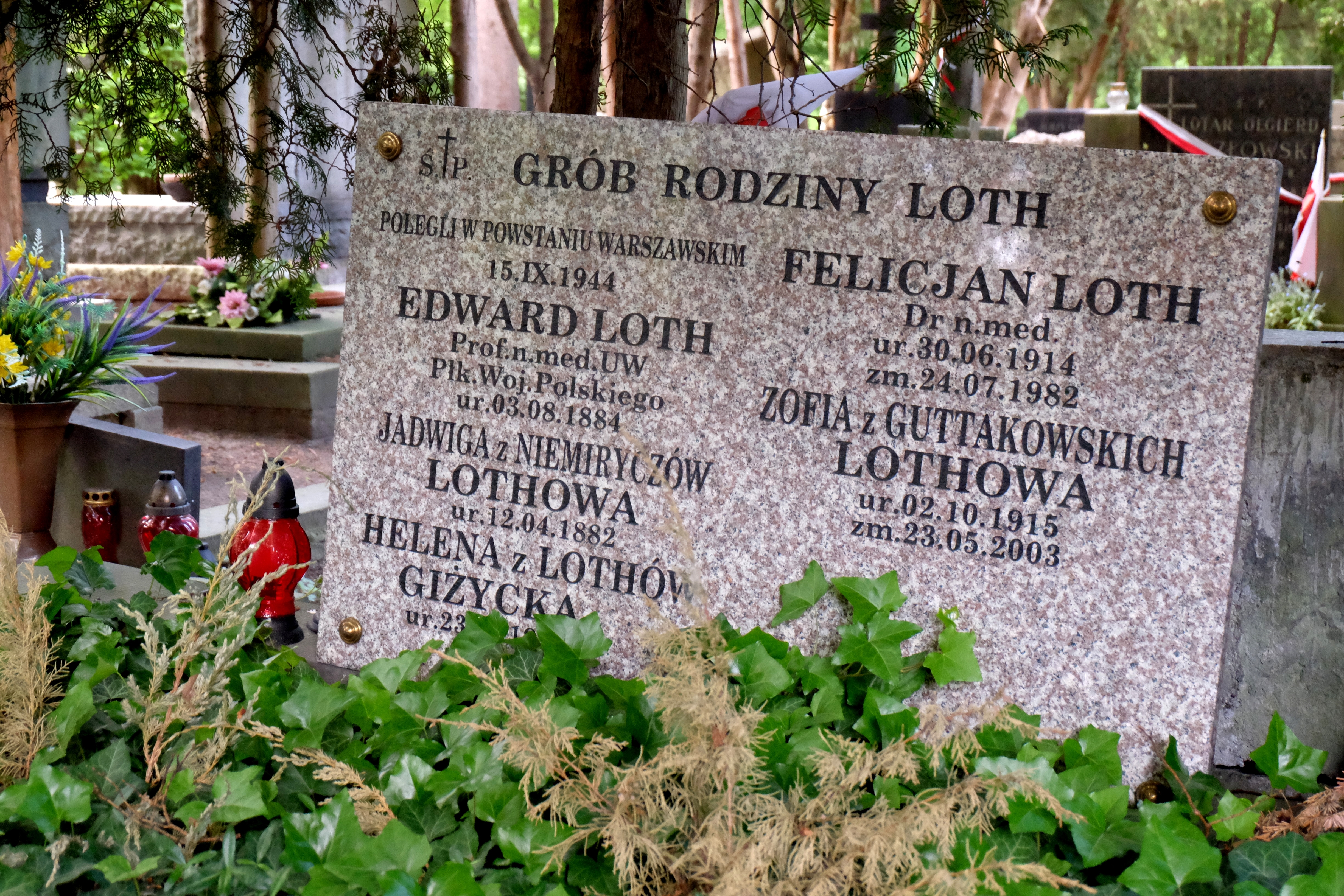 Grób anatoma Edwarda Lotha i jego syna Felicjana Lotha – chirurga na Cmentarzu Wojskowym na Powązkach w Warszawie